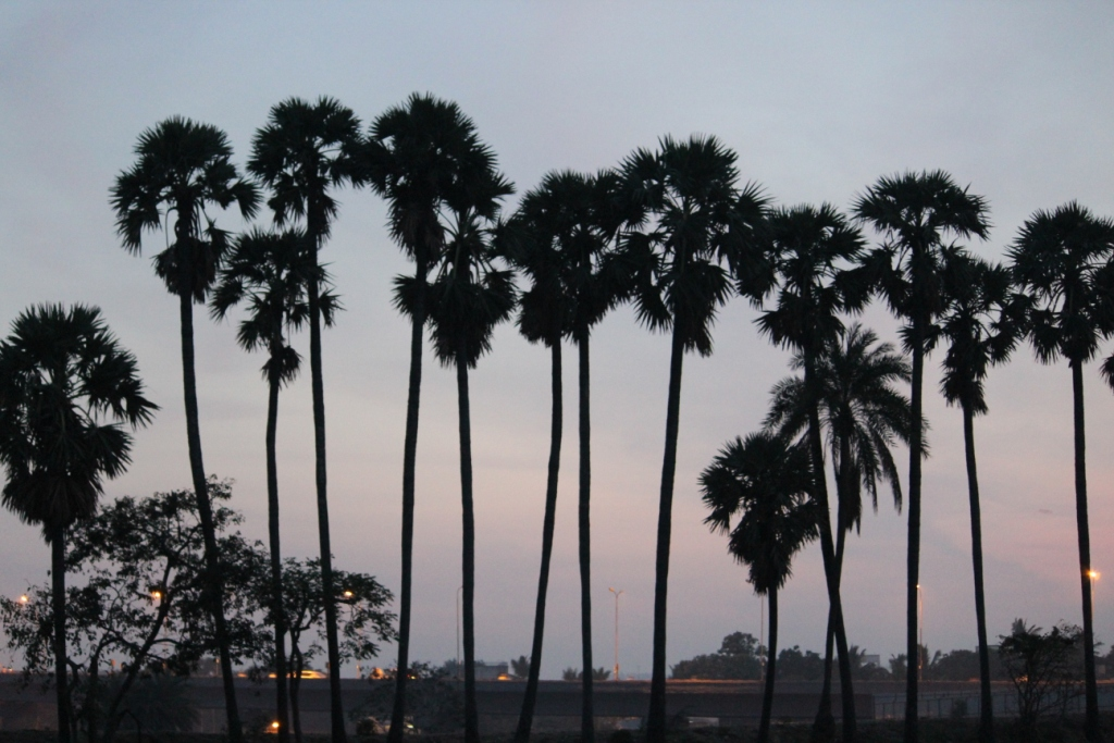 கொரட்டூர் ஏரியிலுள்ள பனை மரங்கள்.